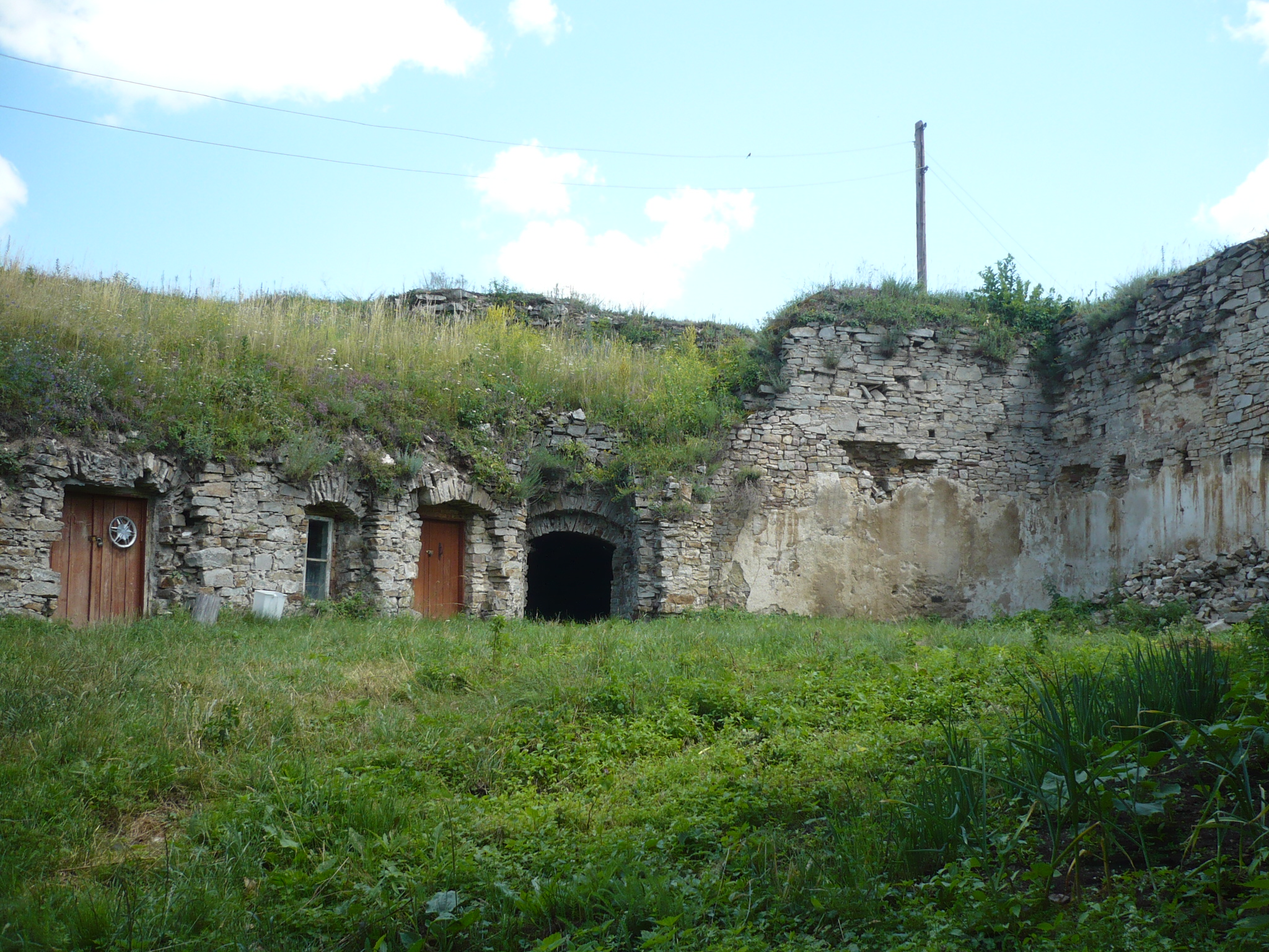 Jazłowiec. Zamek